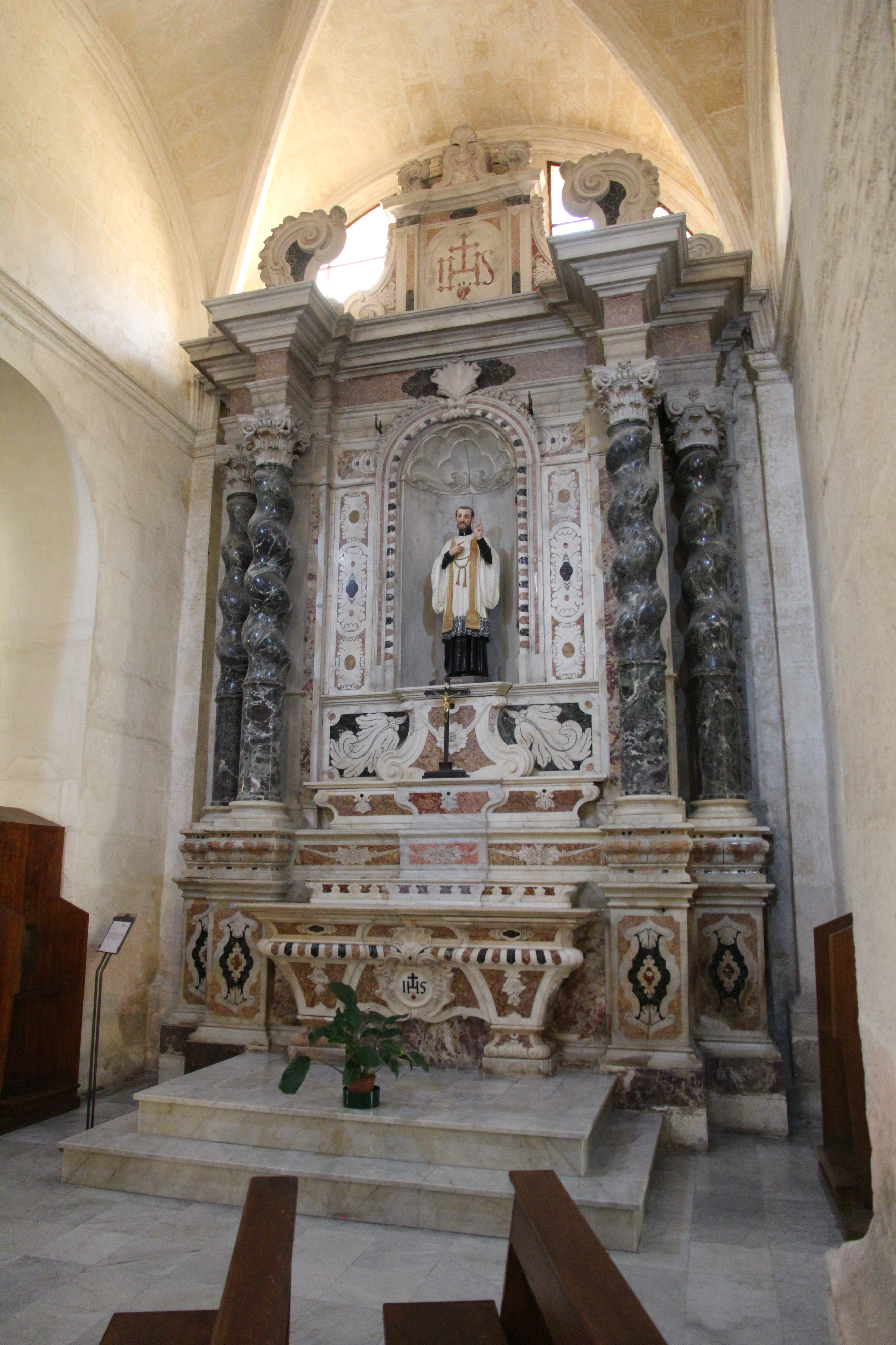 Sassari - Chiesa di Santa Caterina